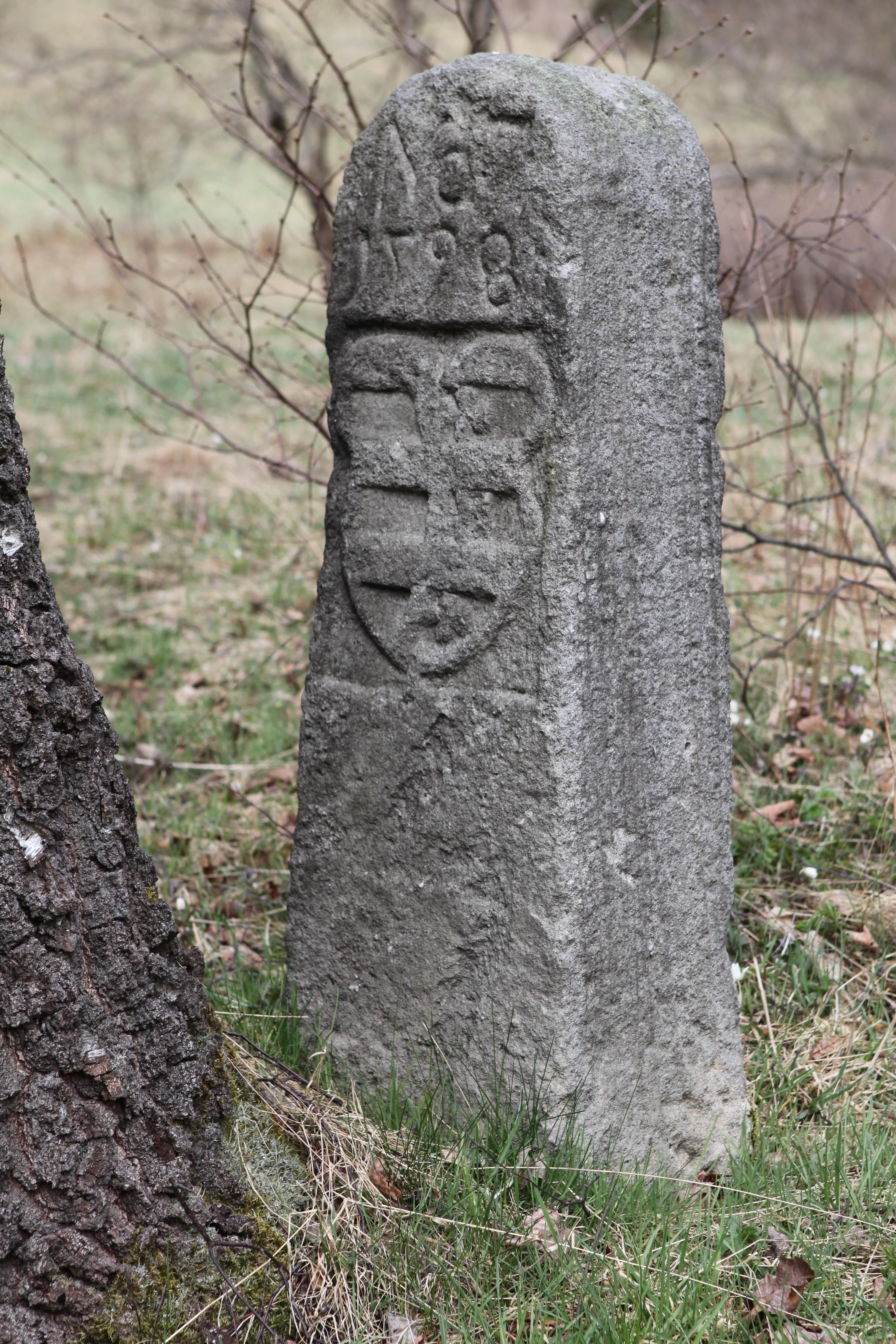 Landesgrenzstein in Lauscha in Thüringen